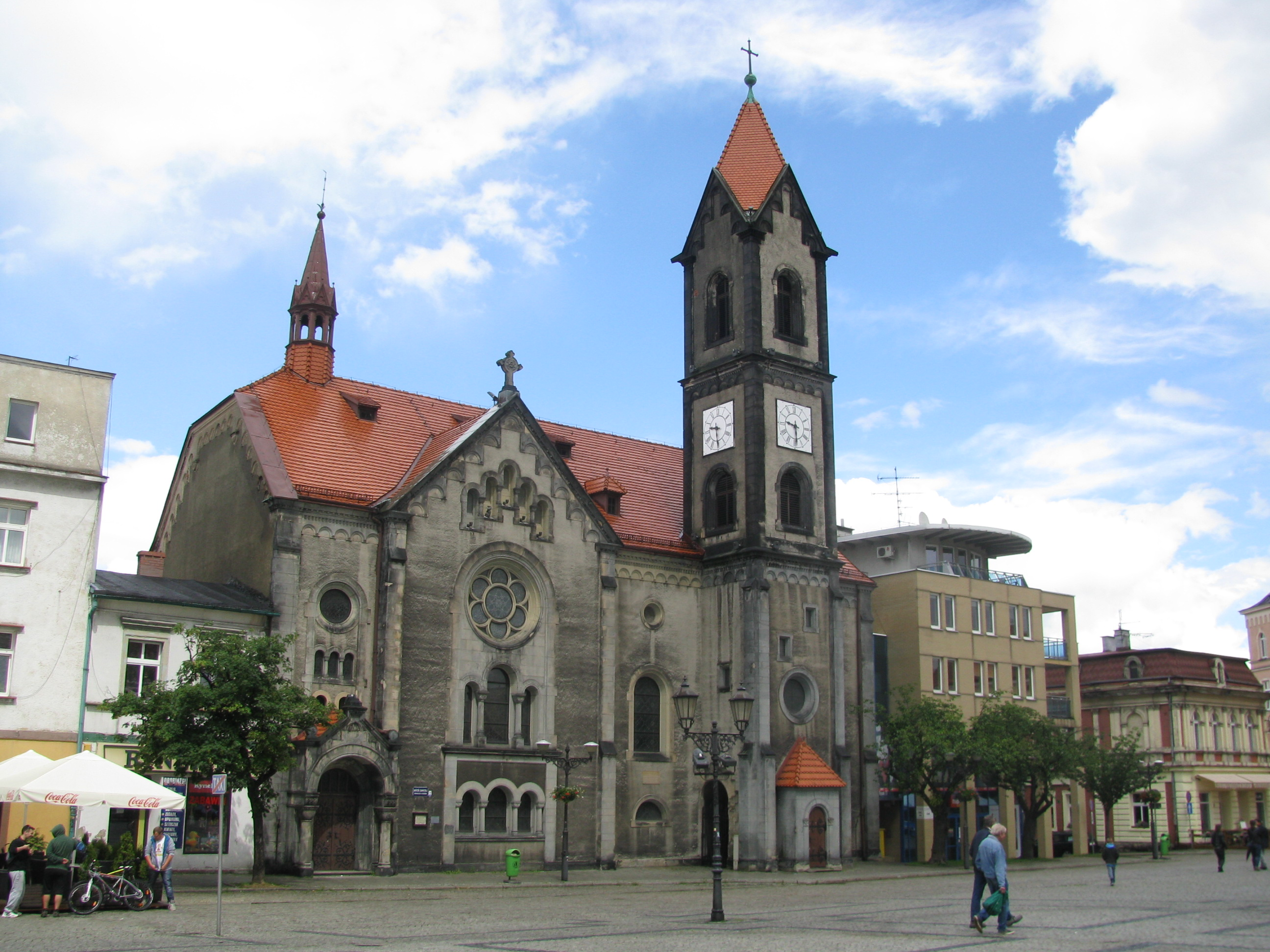 Gebäude am Marktplatz in Tarnowskie Góry